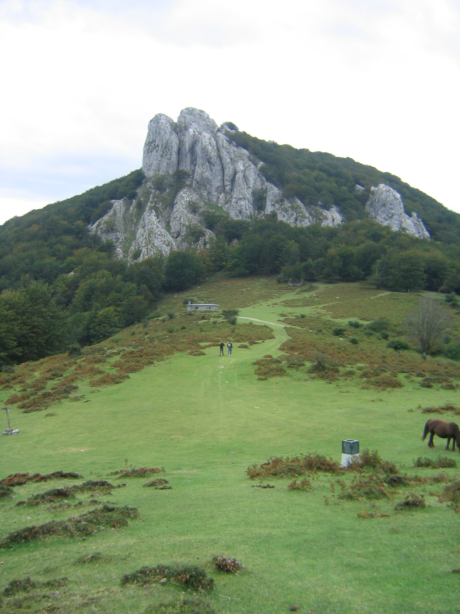 Collado de Zabalandi con el peñón del Ipizte al fondo. Sierra del Anboto (Duranguesado)Vizcaya, País Vaco, España.